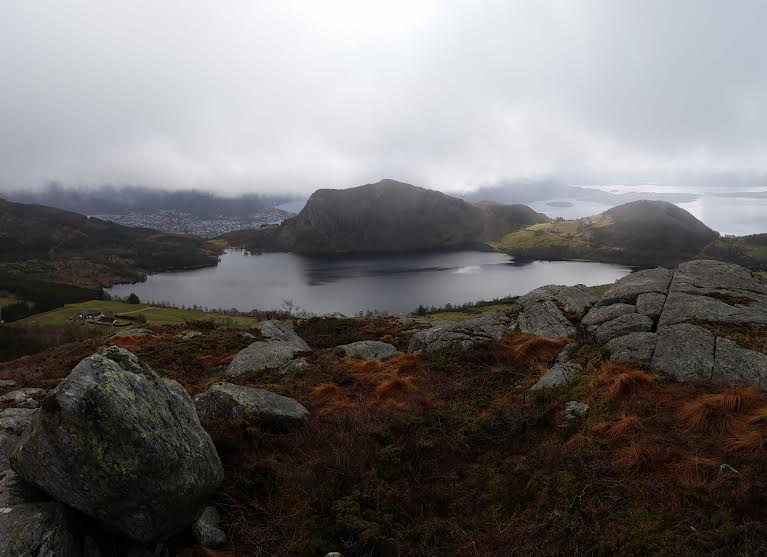 Åsvatnet, sett fra Kjortåsen. Jørpeland i bakgrunnen.